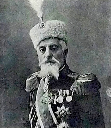 Božidar Janković, Serbian General (b.1849-d.1920)